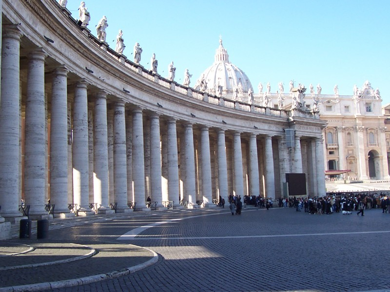 Città del Vaticano - Piazza S. Pietro